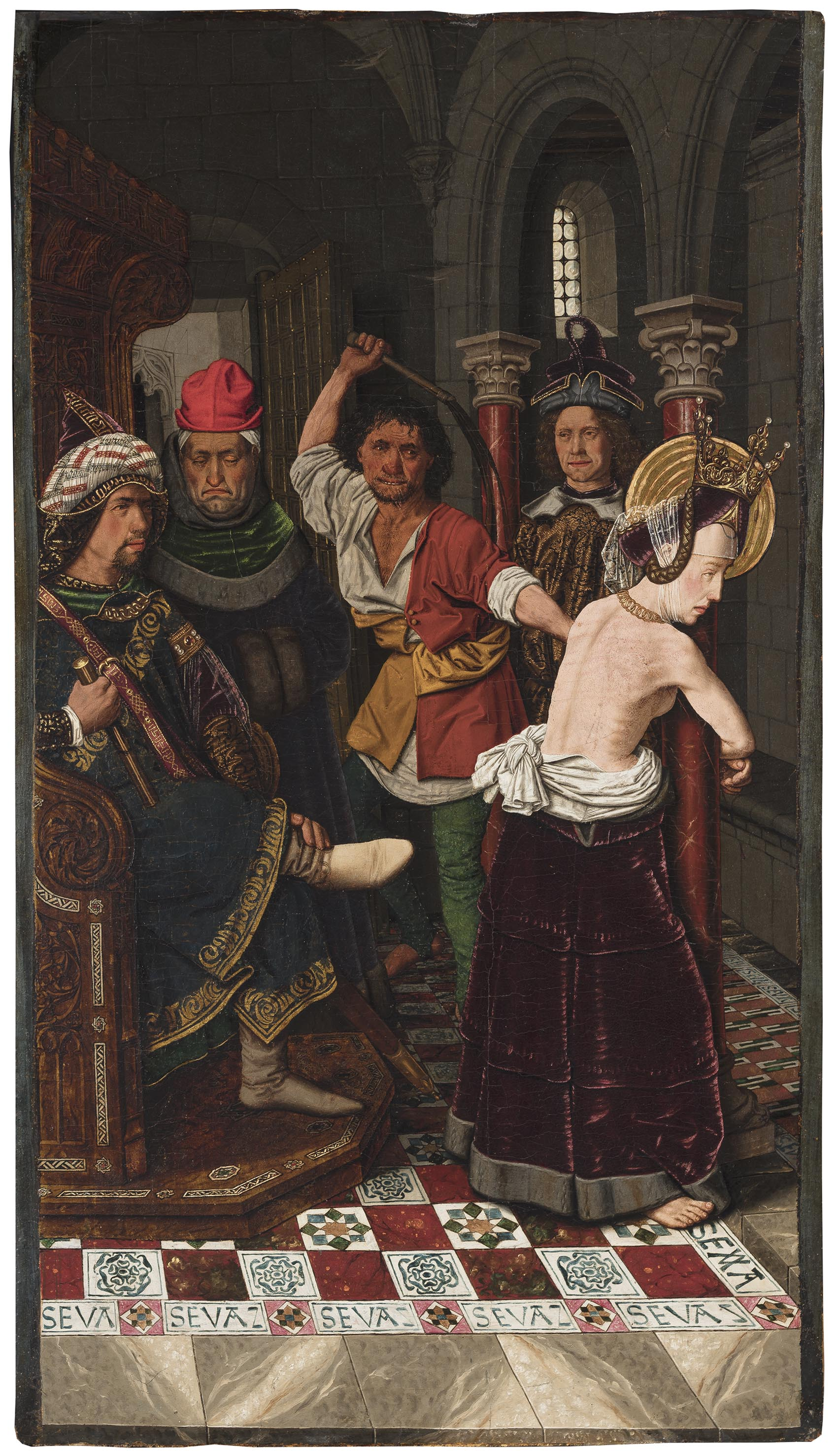 El lienzo representa el momento en que la mártir cristiana Santa Engracia († 303), que es la patrona de Zaragoza, fue azotada antes de ser ejecutada, ya que dicha mártir murió durante la persecución contra los cristianos decretada por el emperador Diocleciano, que fue la más sangrienta de todas las ordenadas por las autoridades romanas.